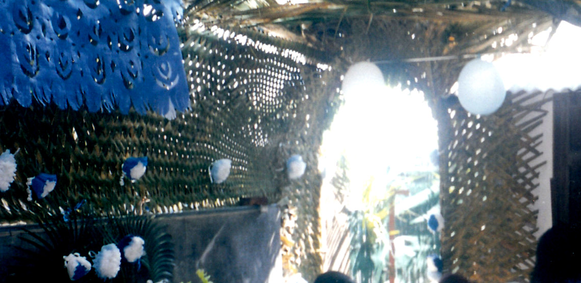 Un arche tressé en feuilles de cocotiers en guise de porte d'entrée.